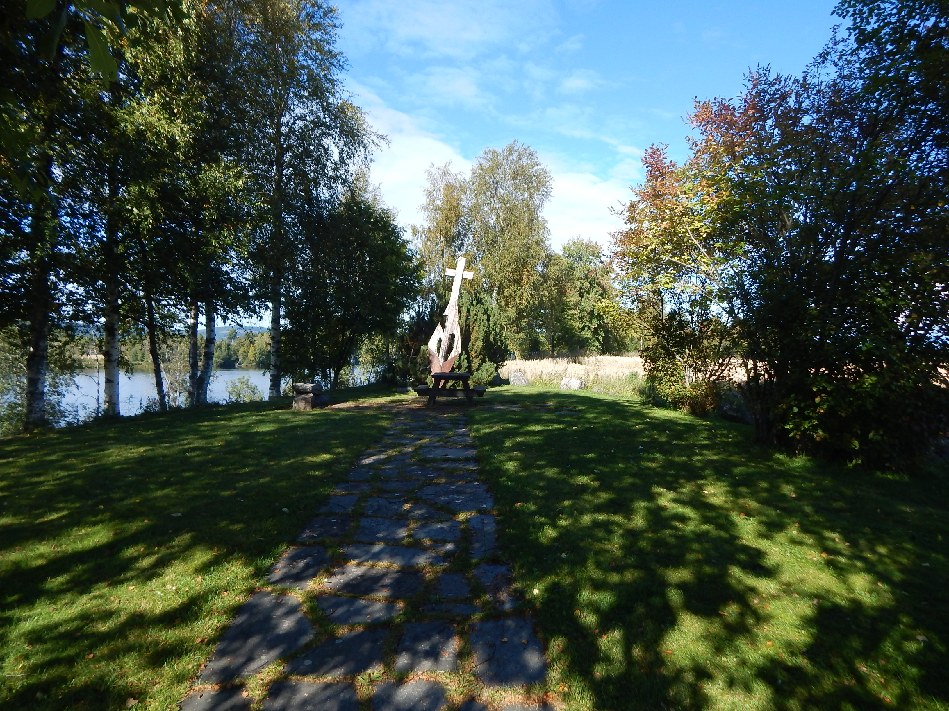 Minnelund for Mariakirken i Våler, som ble avløst av ny kirke i 1806. Minnesmerke avduket 31. august 1997.